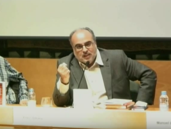 Col·loqui sobre la figura i obra d’Agustí Calvet, 'Gaziel'. En l'acte, organitzat amb motiu del 50è aniversari de la mort de 'Gaziel', van intervenir Francesc-Marc Álvaro, escriptor, periodista i professor de la Universitat Ramon Llull; Jordi Amat, filòleg i escriptor; Enric Juliana, director adjunt de 'La Vanguardia'; Manuel Llanas, filòleg i professor de la Universitat de Vic, i Plàcid Garcia-Planas, reporter de 'La Vanguardia'. L'acte es va celebrar a l'IEC l'11 d'abril de 2014 i va ser organitzat per la Societat Catalana de Llengua i Literatura, filial de l'IEC, i la Generalitat de Catalunya.